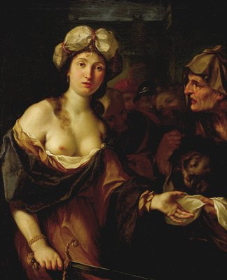 Giuditta con la testa di Olofernetitle QS:P1476,it:"Giuditta con la testa di Oloferne" label QS:Lit,"Giuditta con la testa di Oloferne"